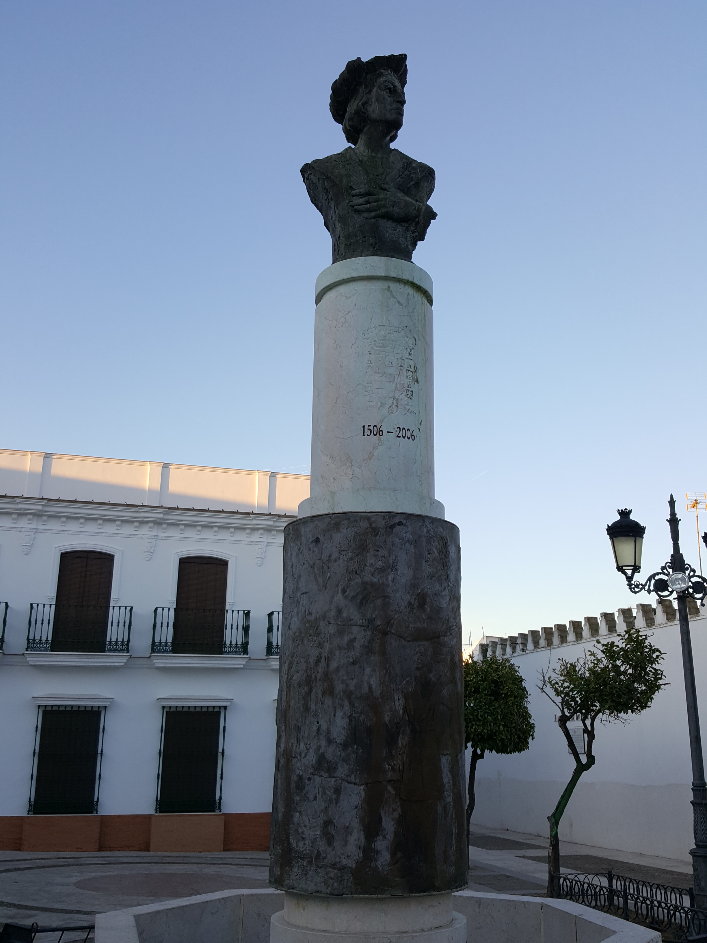 Monumento a Cristóbal Colón en Moguer Andalucía (España). Columna